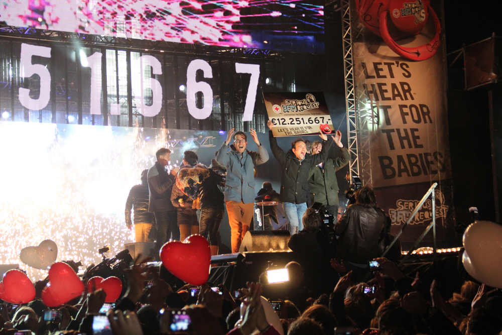 Gerard Ekdom, Michiel Veenstra en Giel Beelen met de cheque tijdens de finale